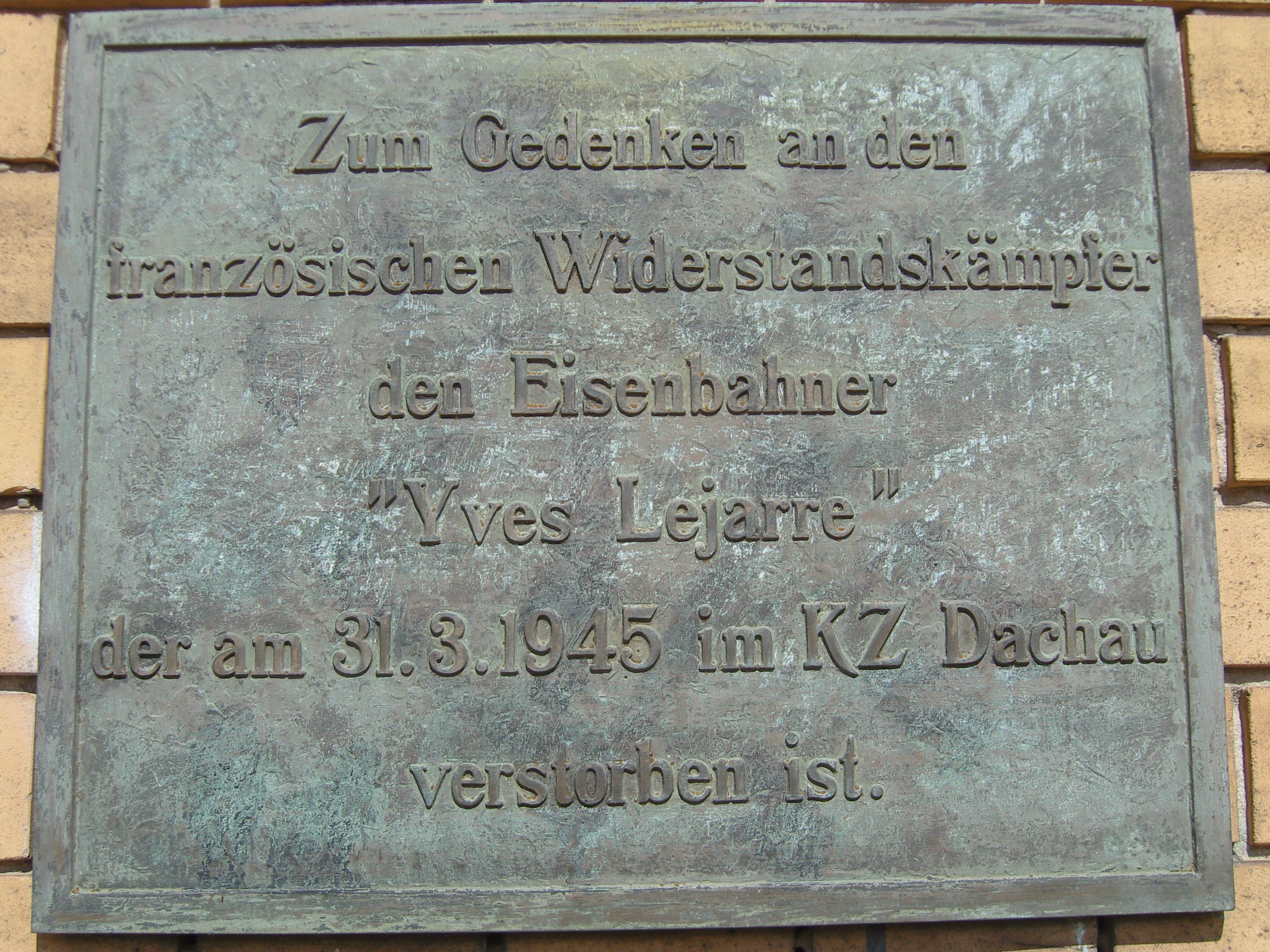 Gedenktafel für den im KZ gestorbenen Eisenbahner Yves Lejarre am Reichsbahnkulturhaus in Senftenberg